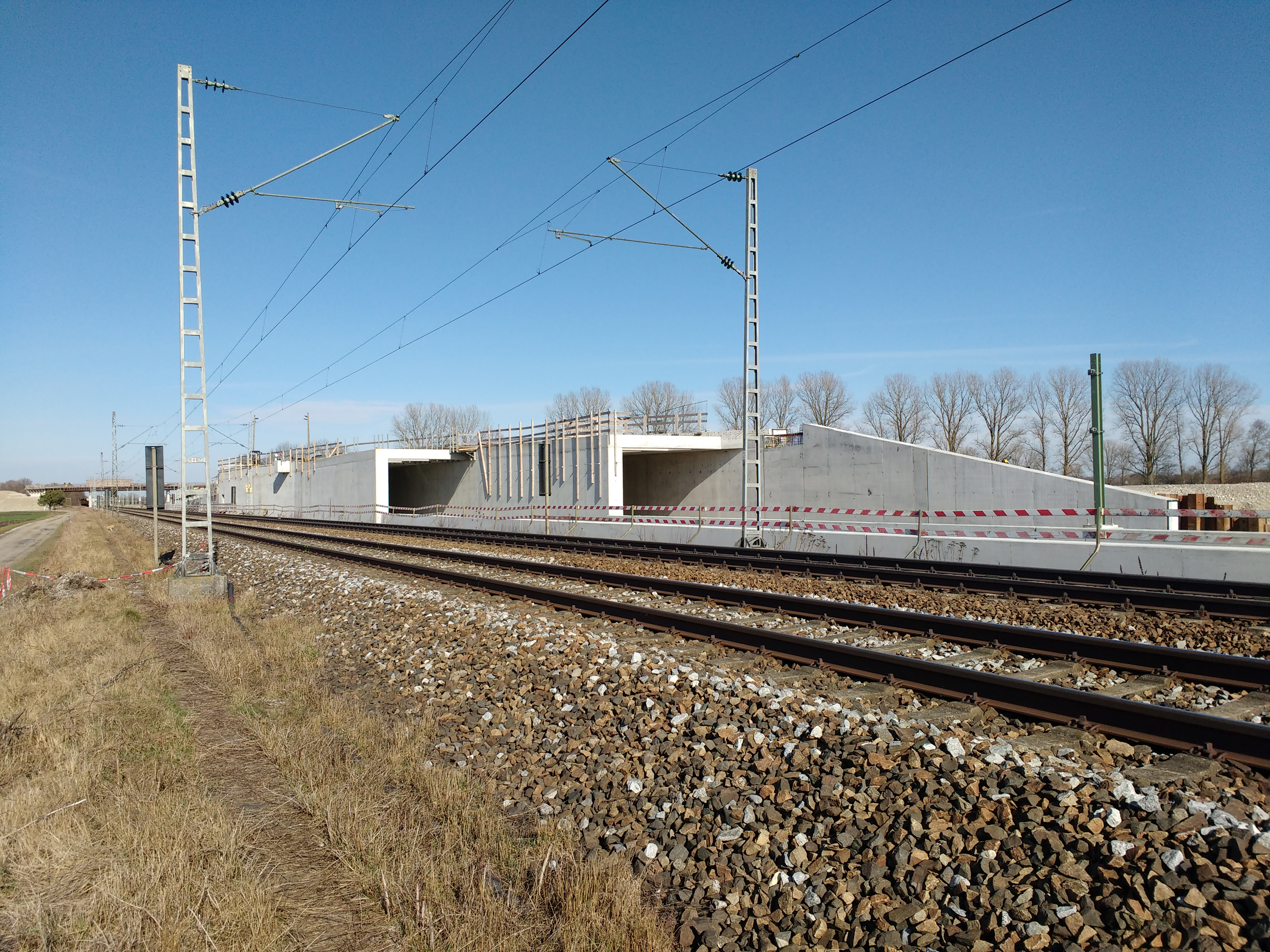 Zukünftige Abzweigung Neufahrner Gegenkurve